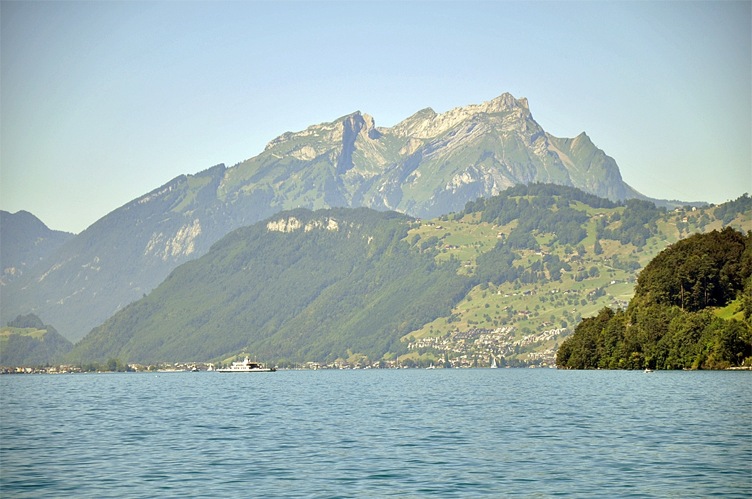 Blick auf den Pilatus von Weggis